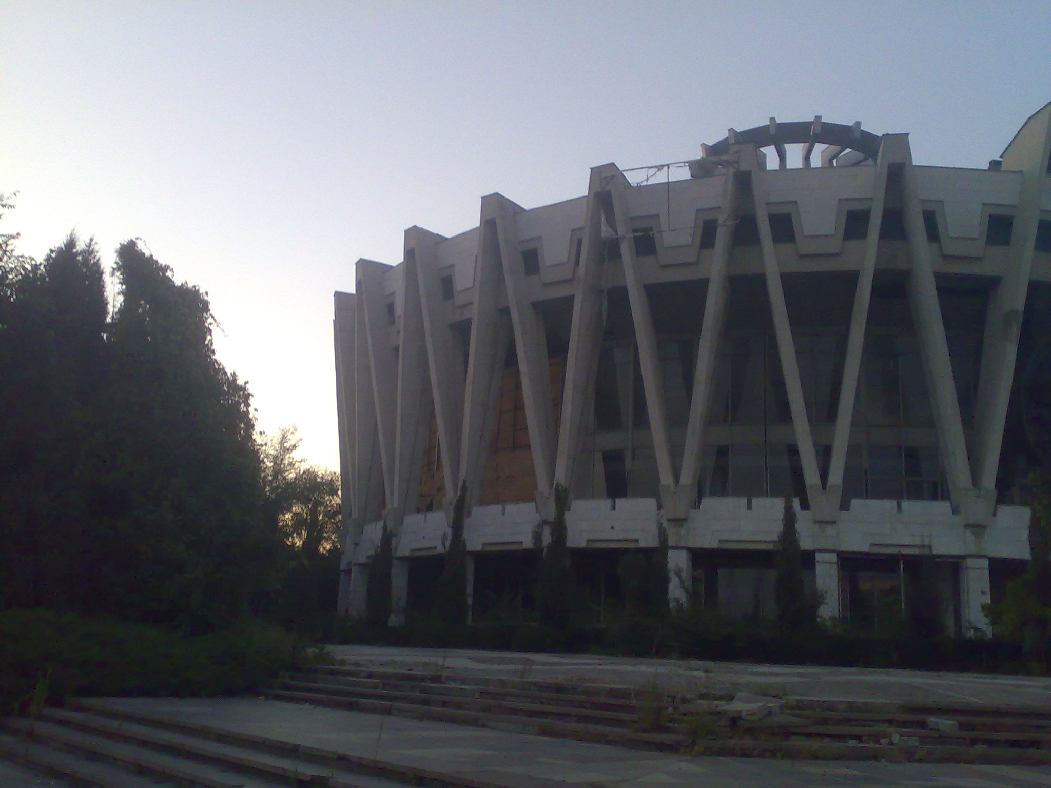 Фото Кишинёвского цирка